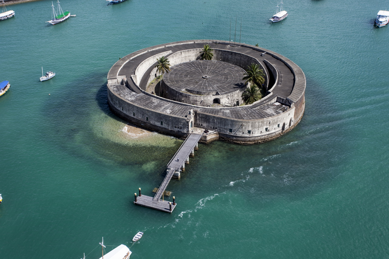 Vista aérea do Forte de São Marcelo, em Salvador.